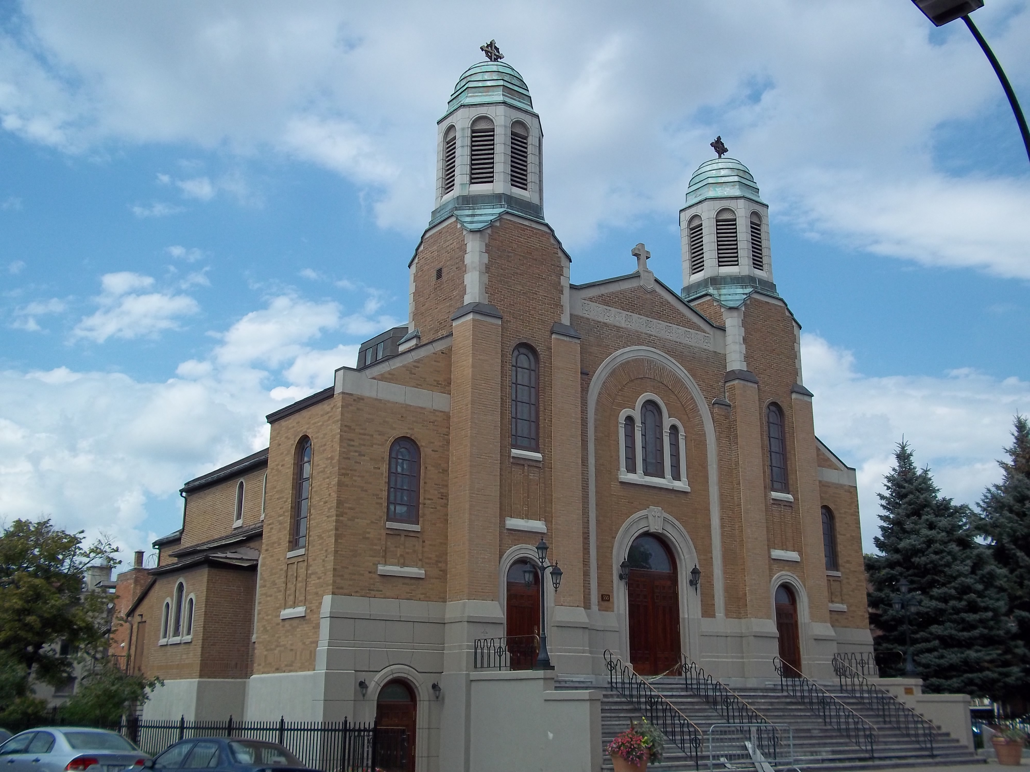 Lieu historique national du Canada de l'Église orthodoxe antiochoise St. George, 555-575, rue Jean-Talon est, Montréal, Québec